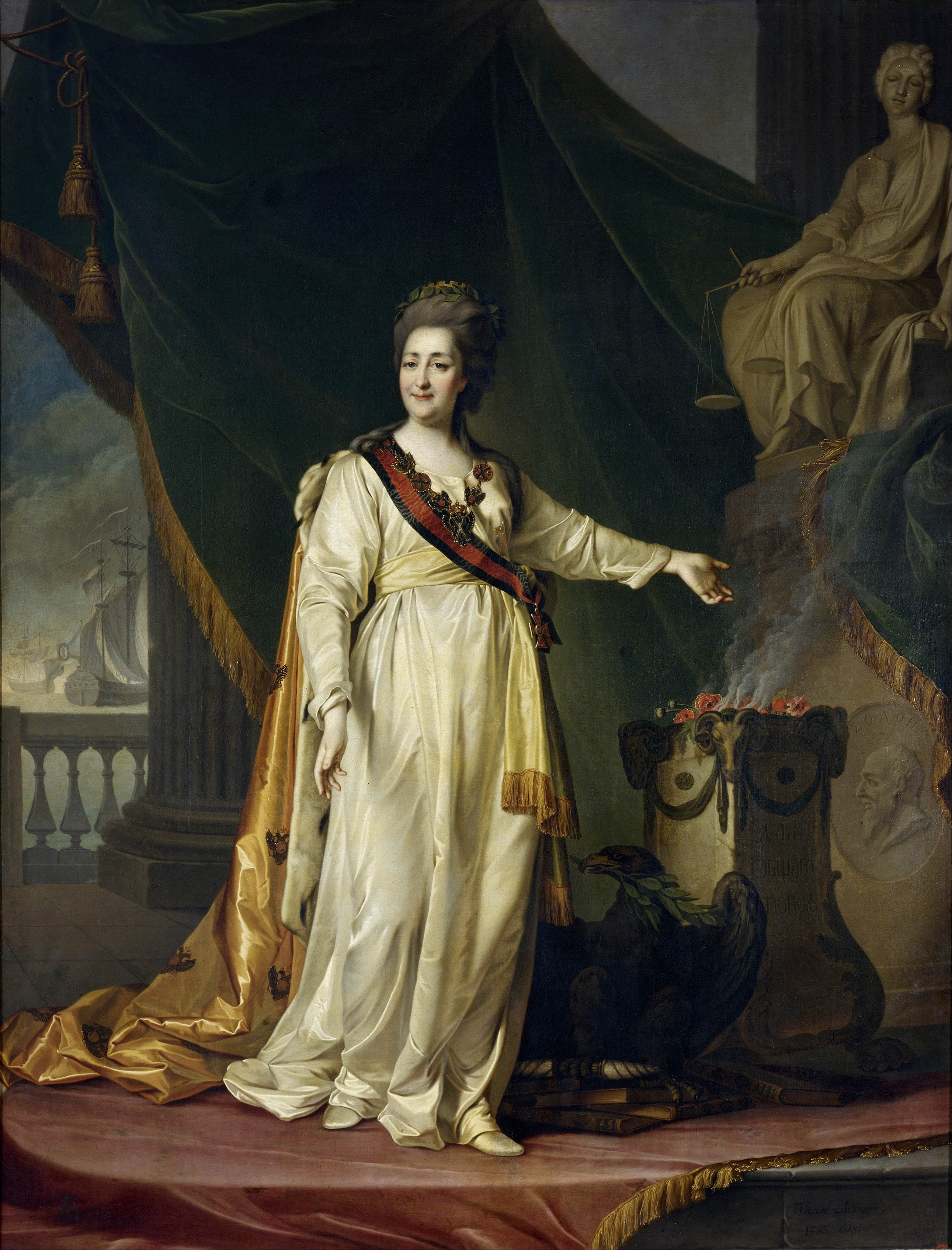 Иконографический тип Ф.С. Рокотова (между 1769 и 1777)